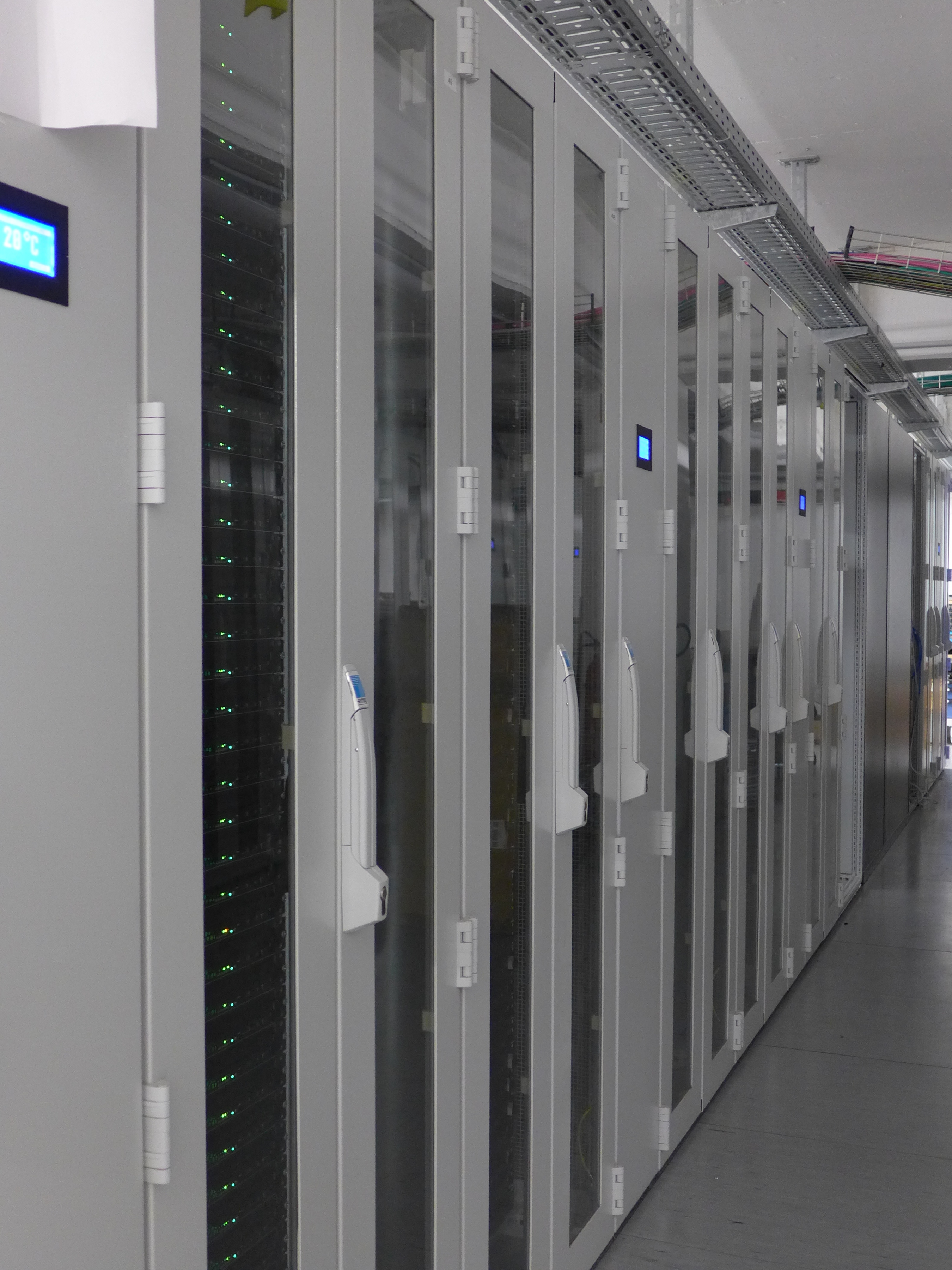 Im Serverraum des Rechenzentrums Atlas des AEI Hannover als Teil des Projekts Einstein@Home. Aufnahme während öffentlicher Führung in der Nacht die Wissen schafft 2016.